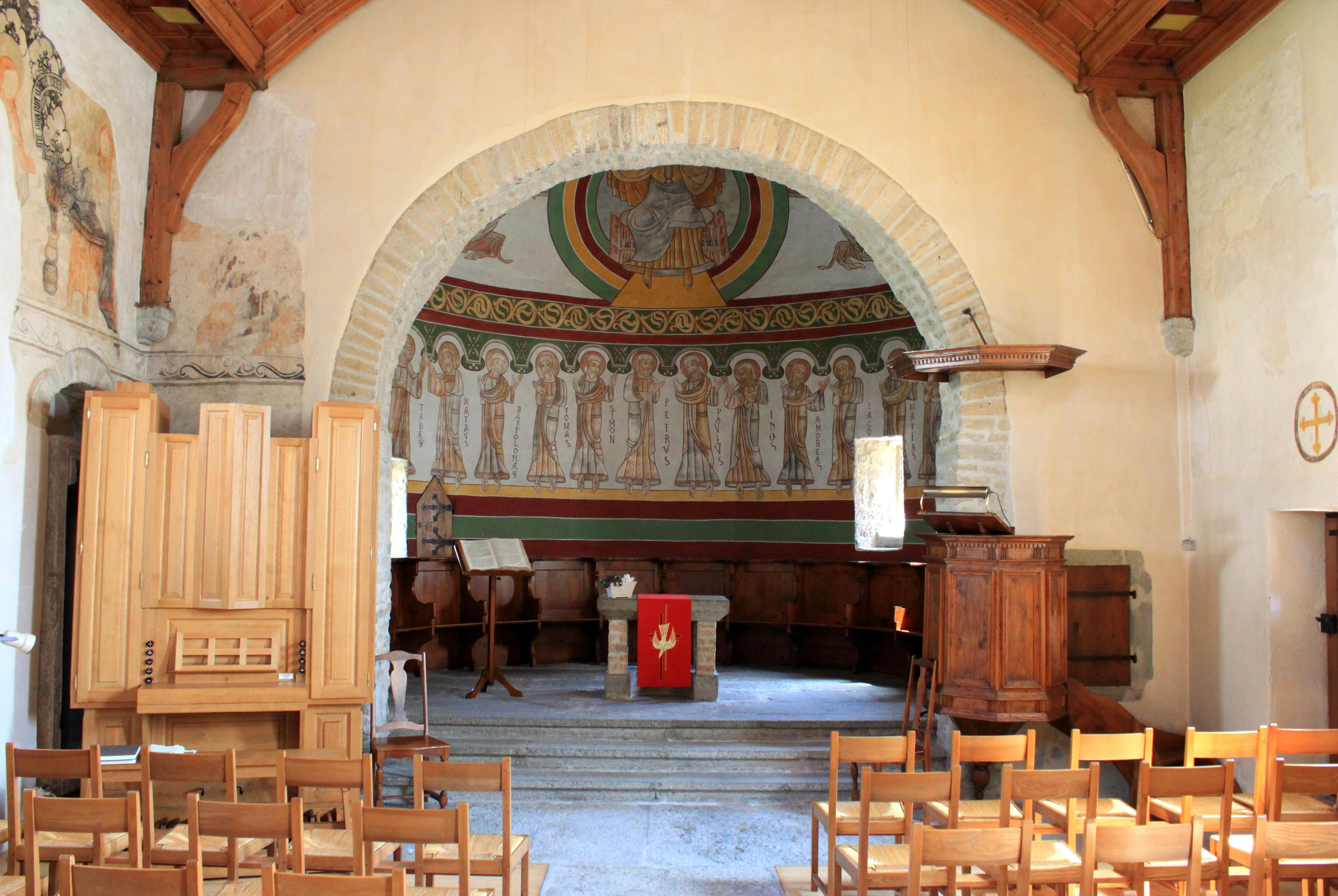 Suisse, canton de Vaud, Avenches/Donatyre, Chapelle romane dédiée à Sainte-Thècles. Construite au 11e siècle, avec des pierres de l’enceinte de la cité romaine proche d’Avenches.